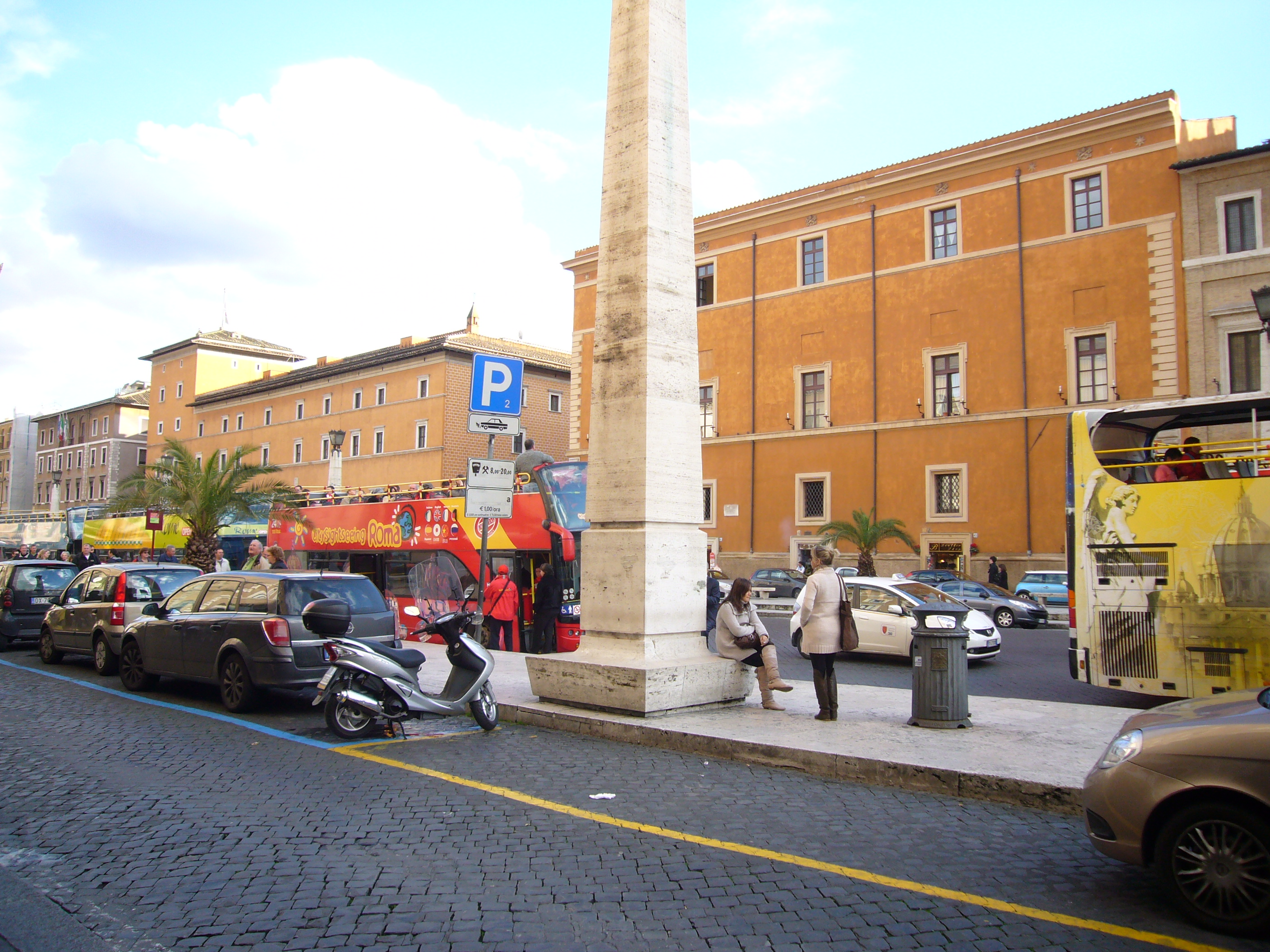 Roma, via della Conciliazione, palazzo Serristori.